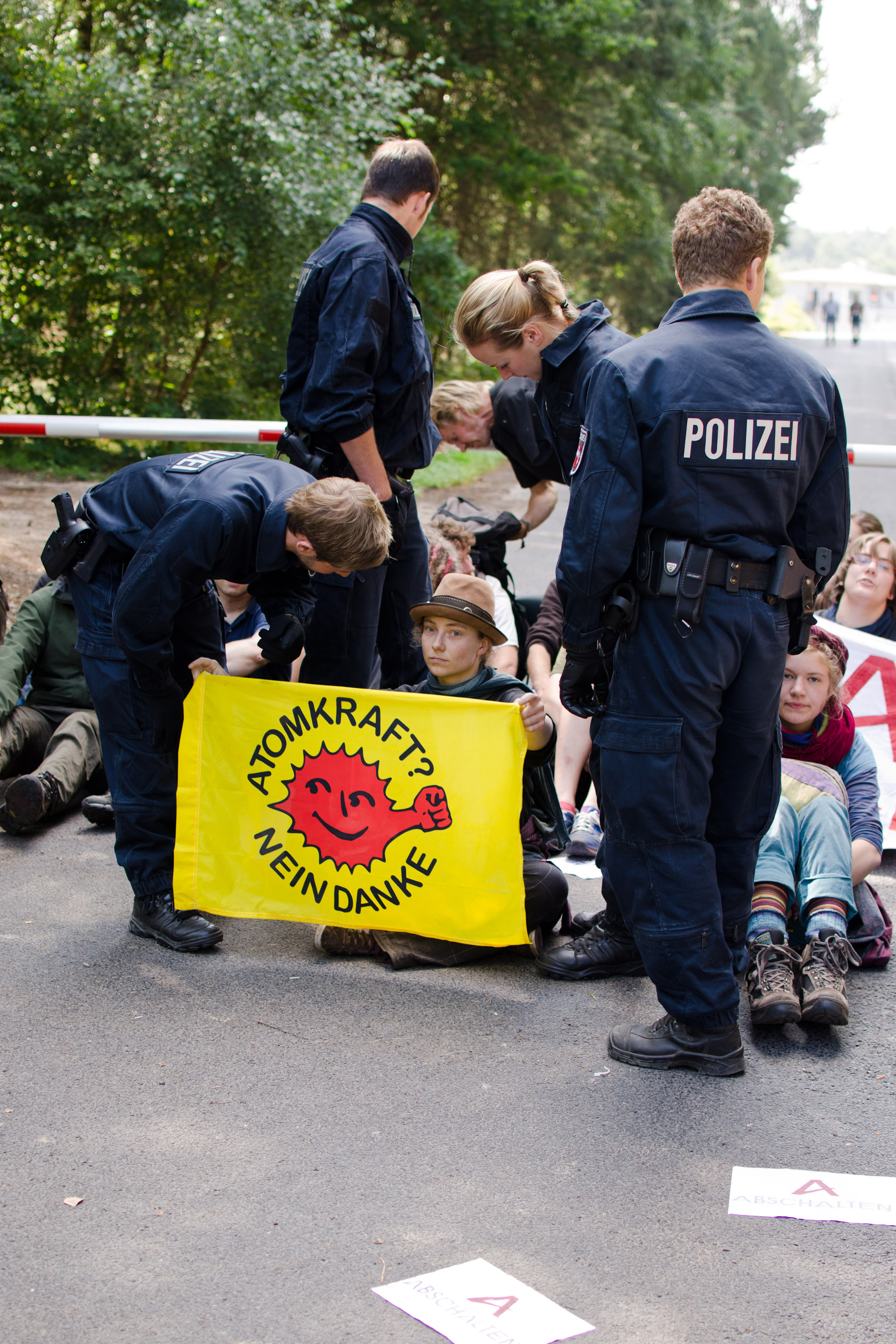 Die Umweltaktivistin Hanna Poddig (mittig auf dem Boden sitzend) im Jahr 2013 bei einer Blockade der Areva-Brennelementefabrik in Lingen